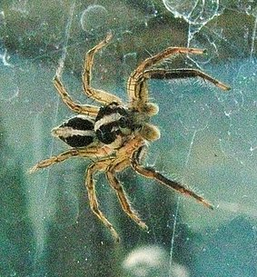 male Plexippus paykulli from Tennouji Zoo, Osaka, Japan. (identified by Akio Tanikawa)